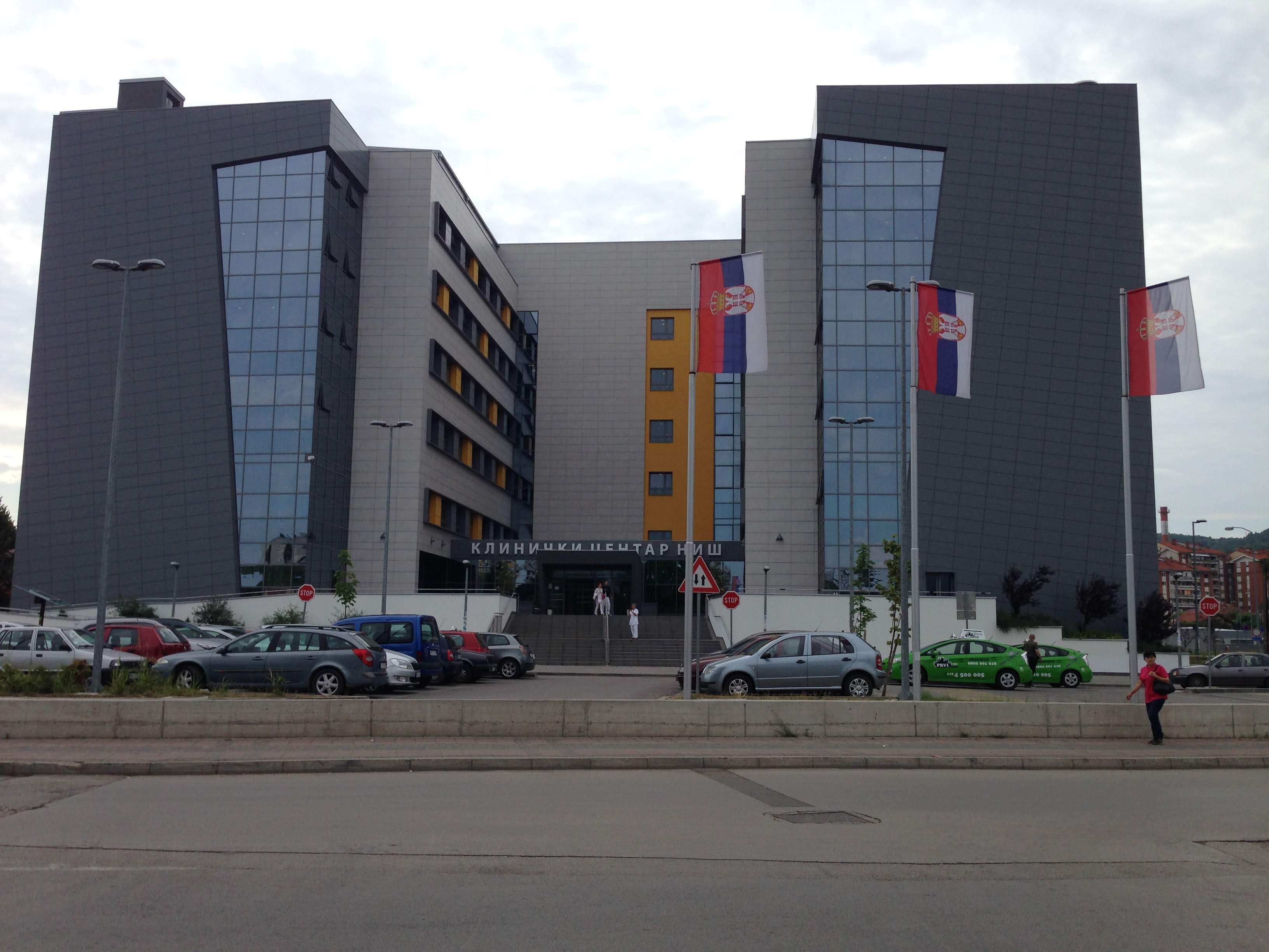 Srpski (latinica): Zgrada novog Kliničkog centra Niš